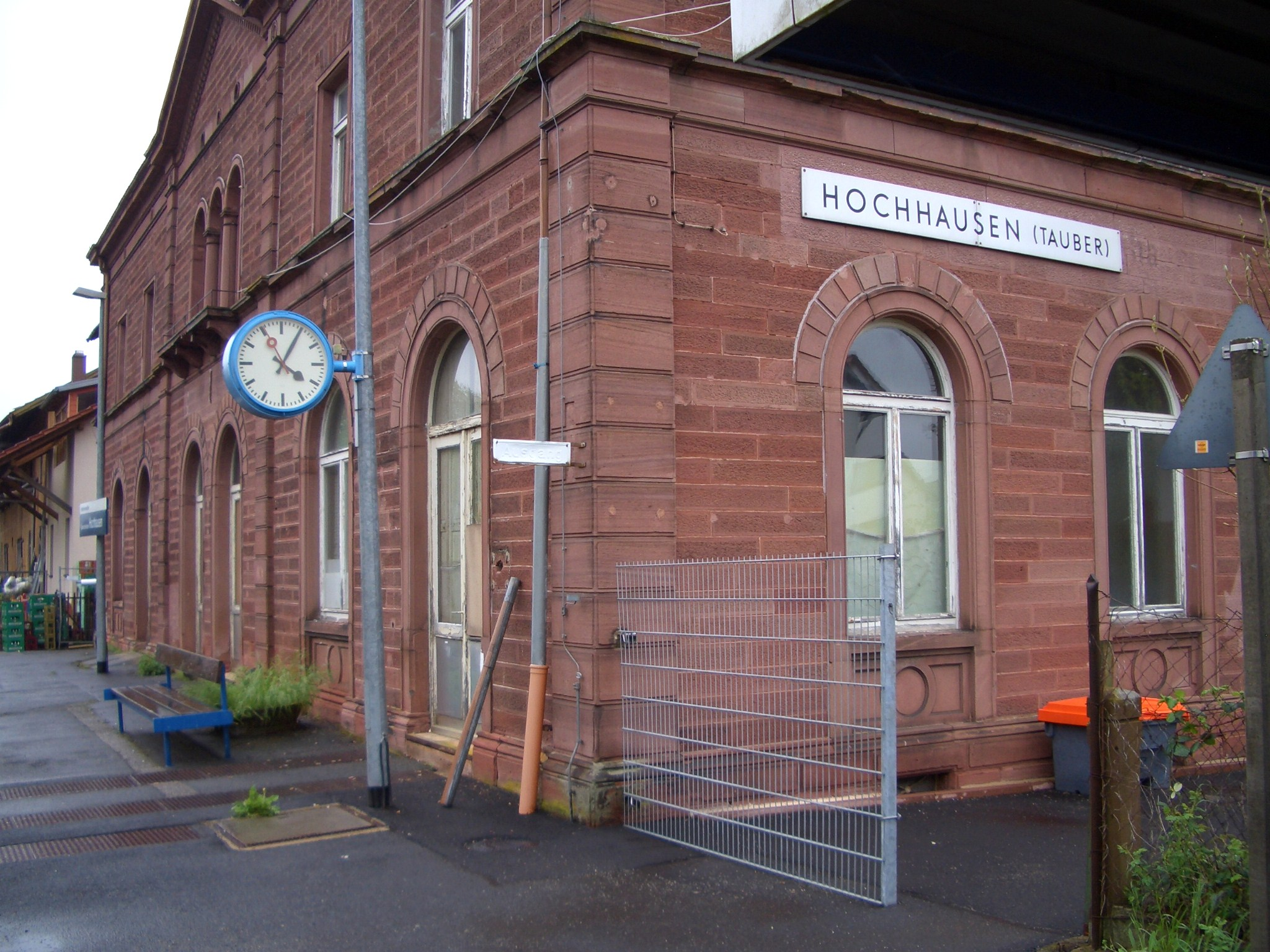 ehemaliges Empfangsgebäude Bahnhof Hochhausen (Tauber) mit Bahnsteig, Blick Richtung Gamburg. Das Gebäude wird heute privat bewohnt und dient auch als Lager des im Hintergrund sichtbaren Lagerhaus Geier.